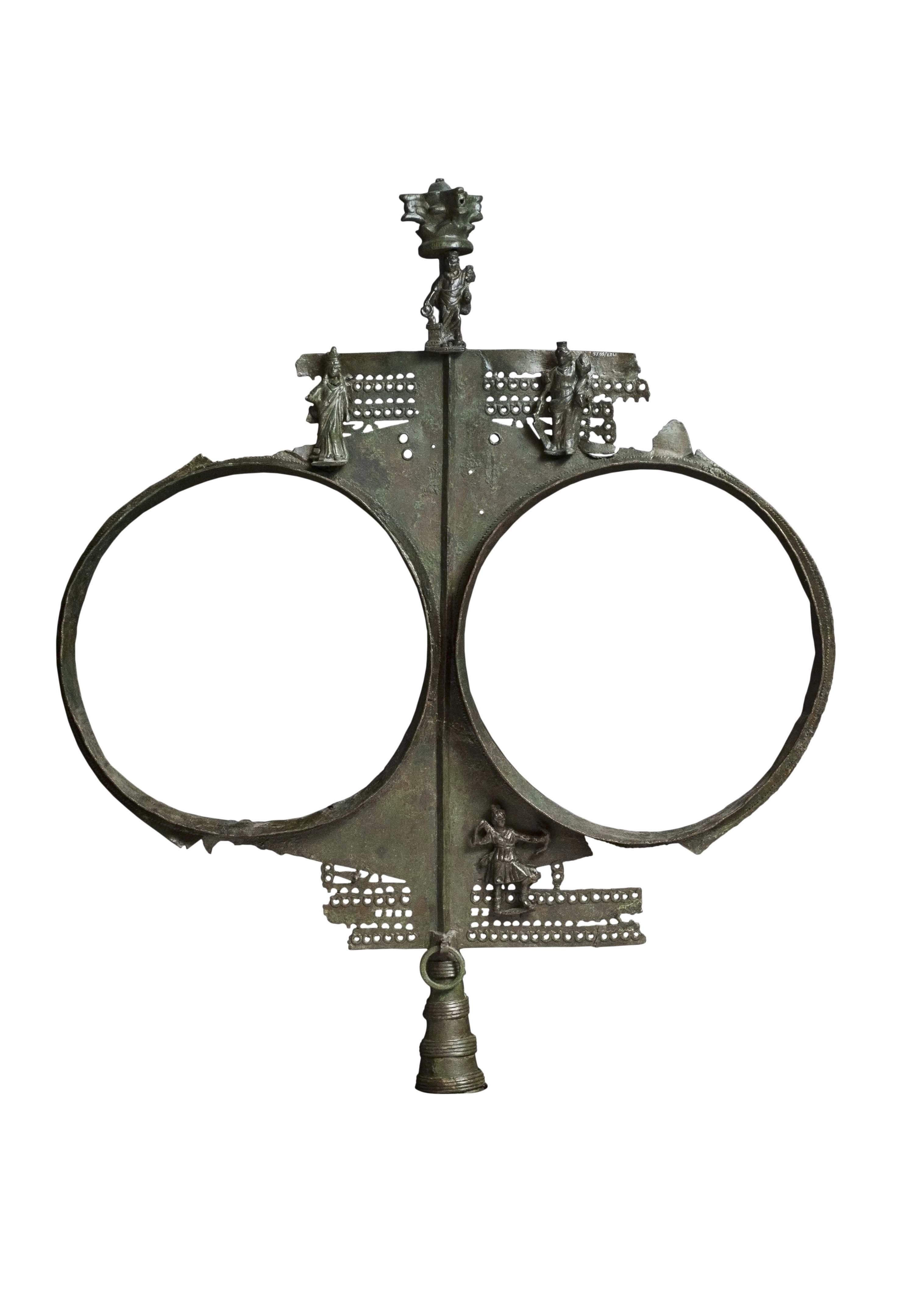 Estandarte de Pollentia (Cultura Romana). Número de inventario: 1927-64-7.